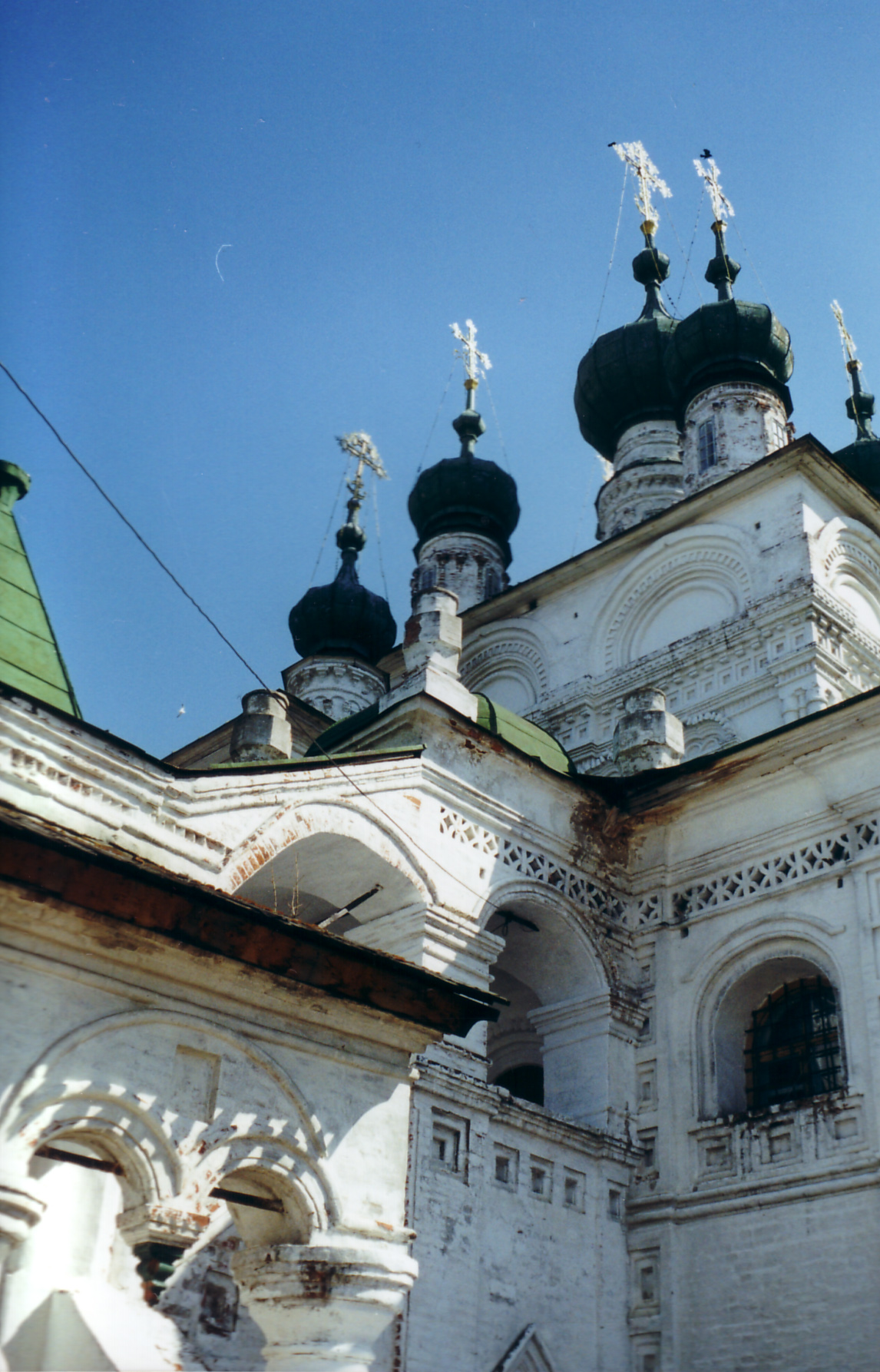 Троицкий собор города Соликамск, вид. Город Соликамск